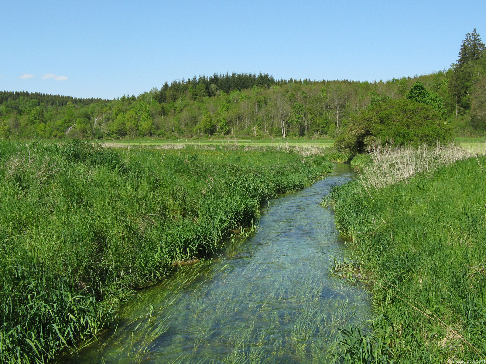 Die Lone bei der Vogelherdhöhle, Landschaftsschutzgebiet „Lone- und Hürbetal“.